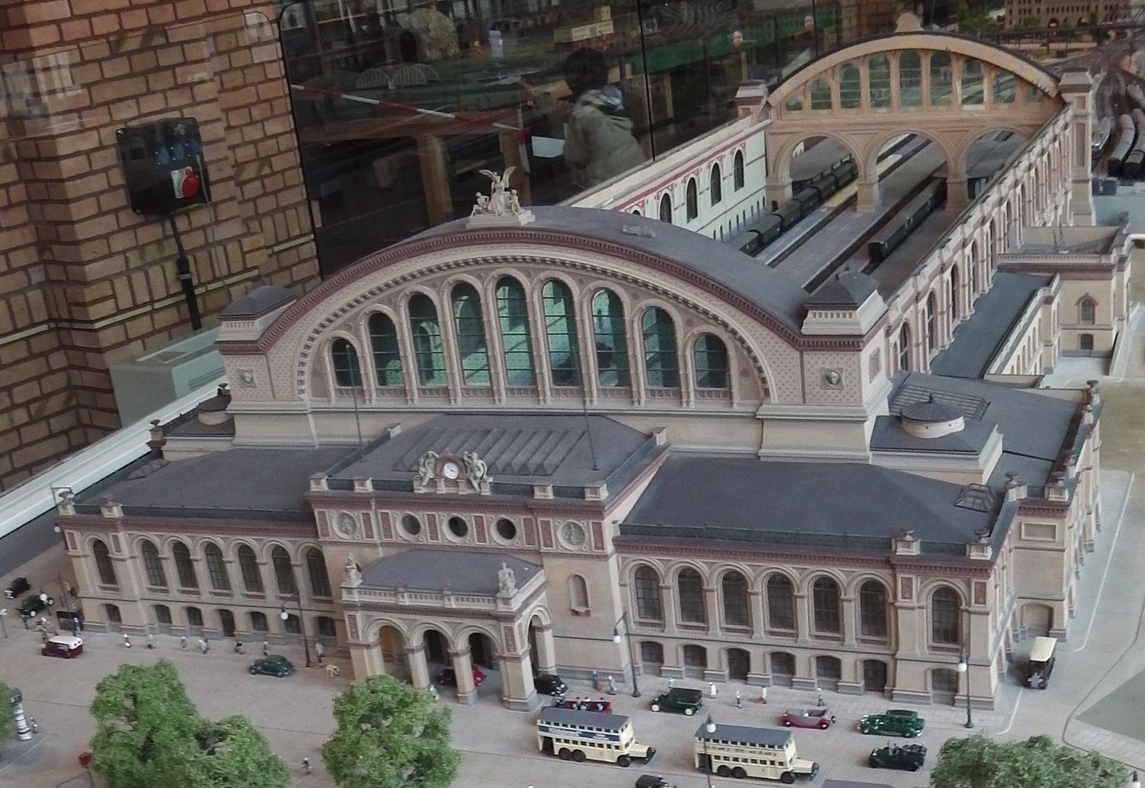 Modell des Anhalter Bahnhofs im DeutschenTechnikmuseum Berlin